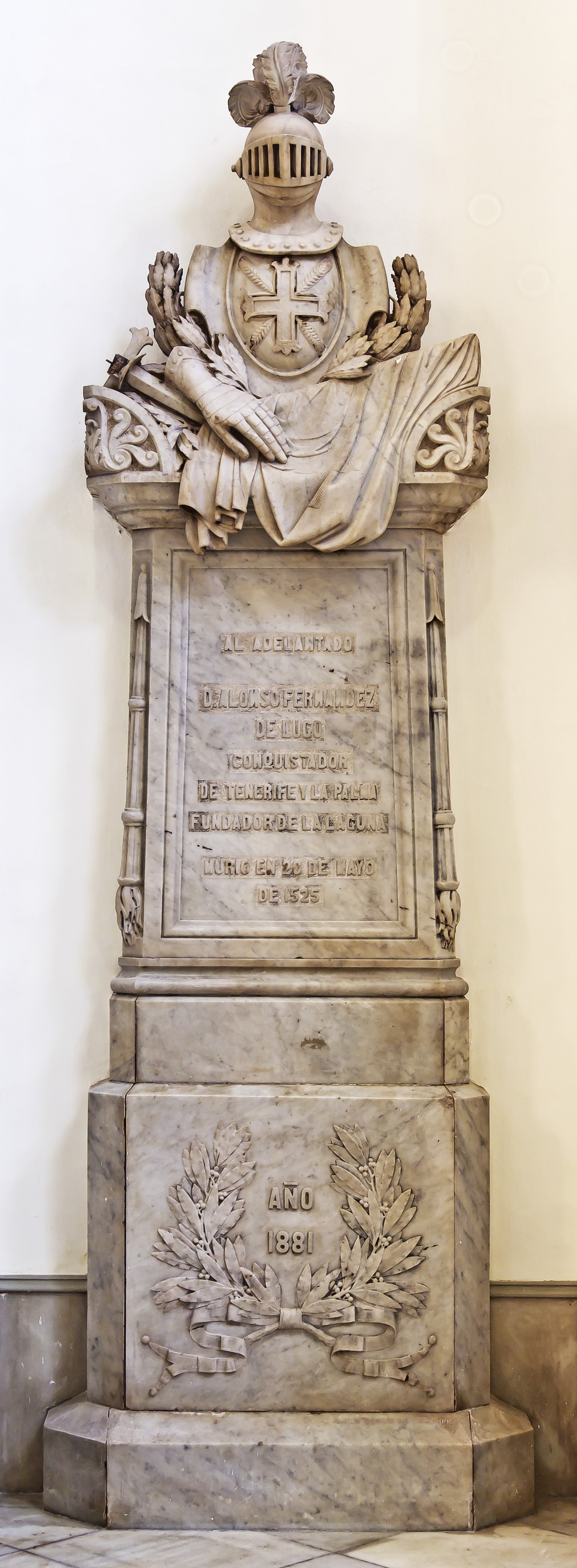 Denkmal für Alonso Fernandez de Lugo in der Kathedrale in La Laguna, geschaffen von Manuel de Oraá und Angelo Cherubini